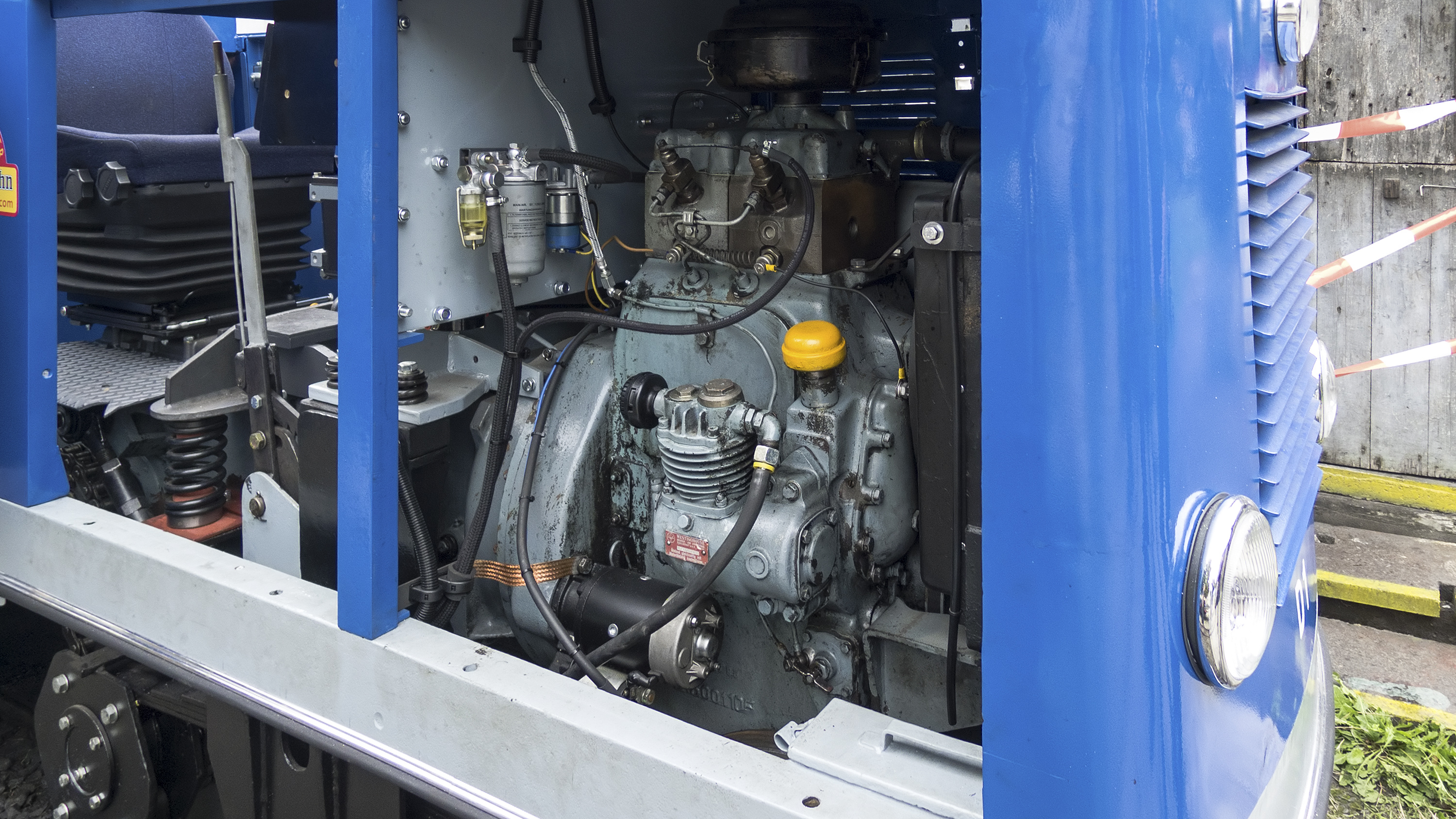 Liliputbahn im Wiener Prater in Wien 2, Diesellok D1, Motor